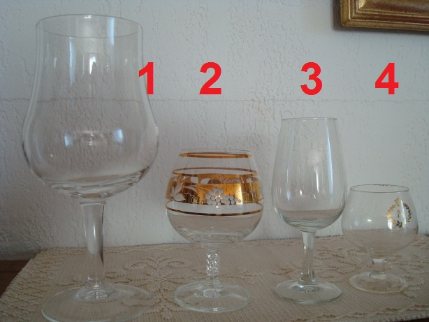 Verres tulipe de déustation, à vin rouge (1) 75cl maxi, vin doux (2), vin de touraine (3), à liqueur (4)